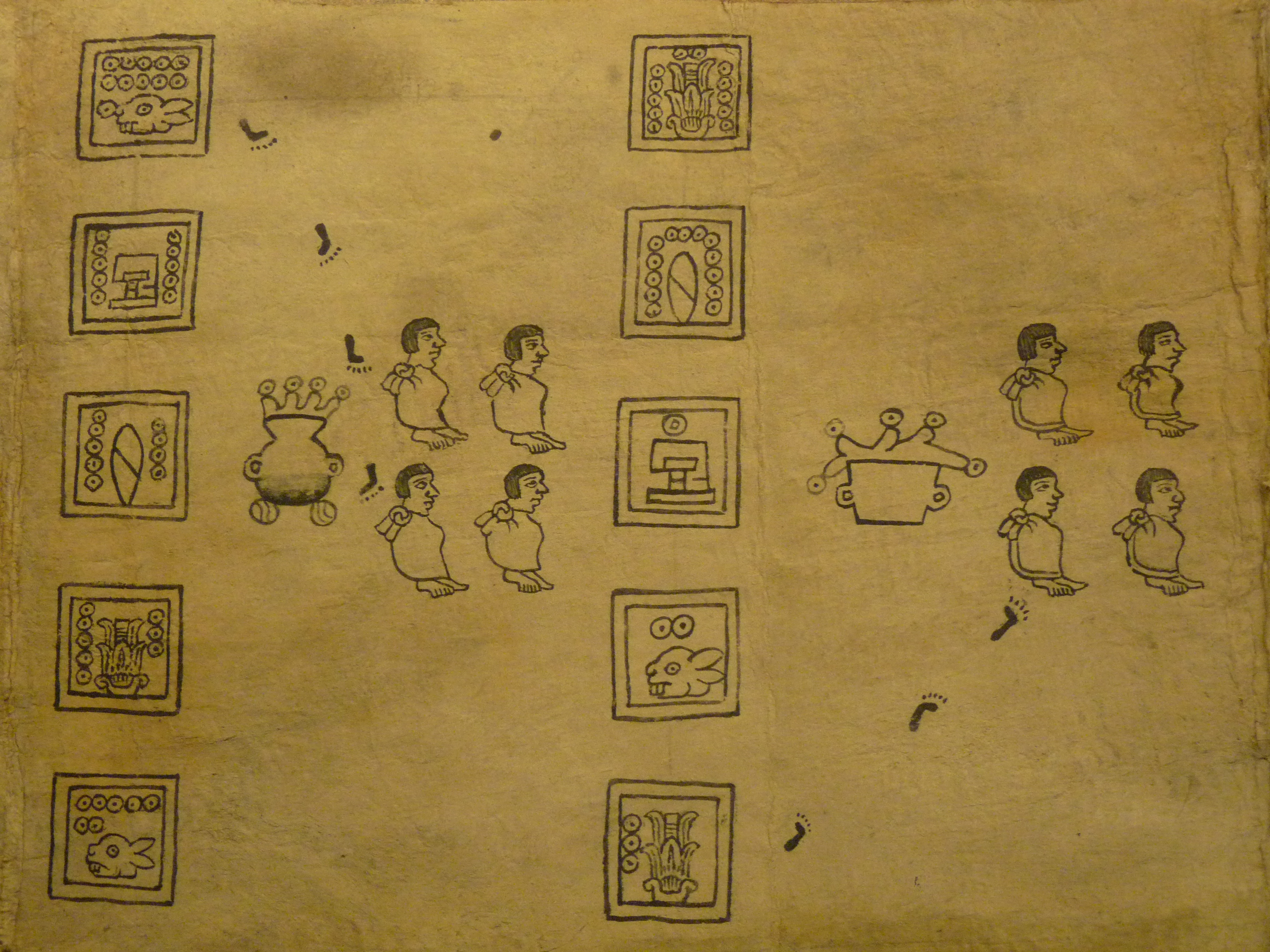 Codex Boturini (also known as Tira de la peregrinación), folio 9